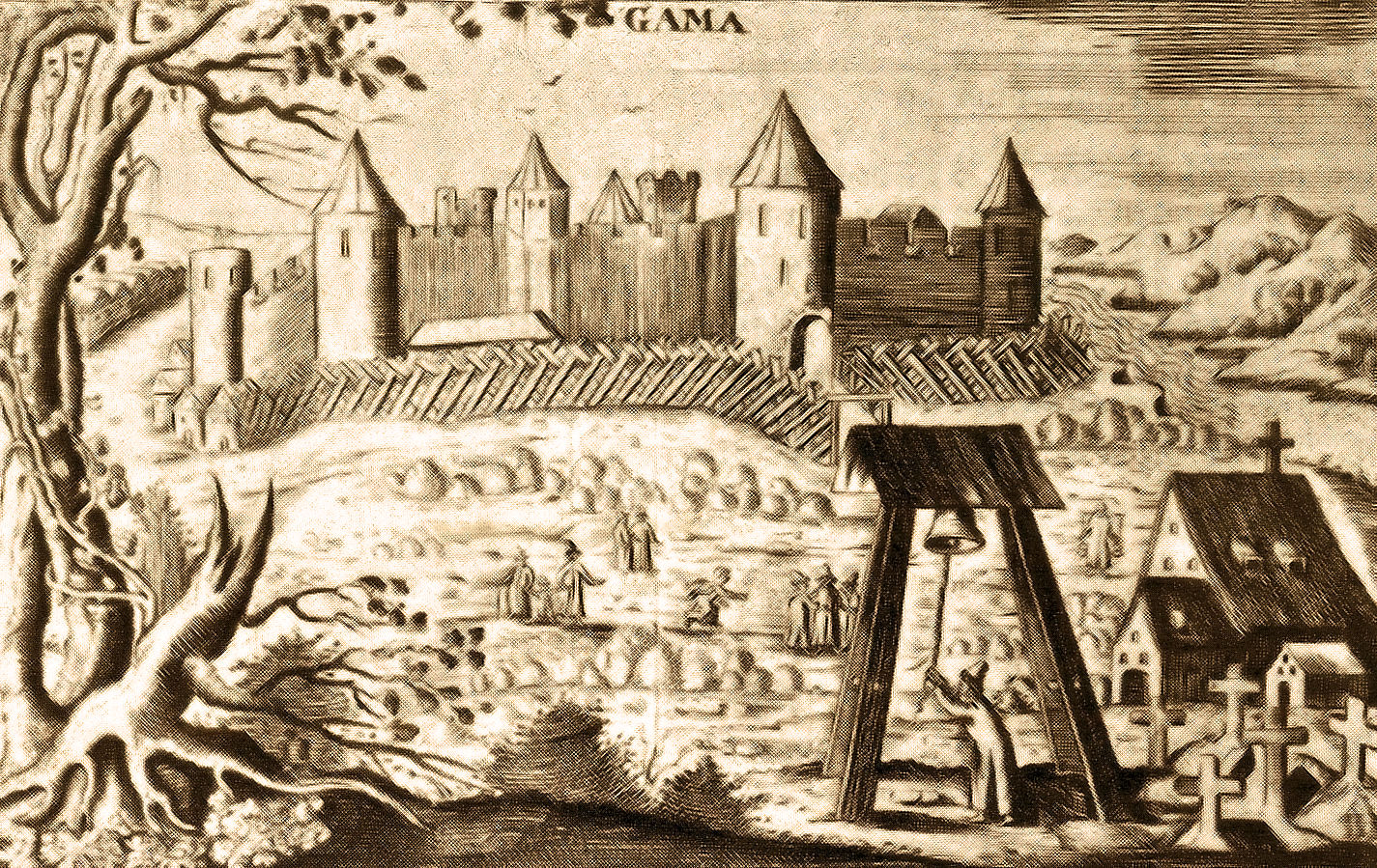 Jaaman linna